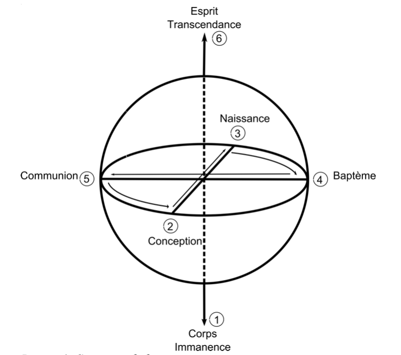 Schéma de la structure de la perception selon Raymon Abellio dans La structure absolue.